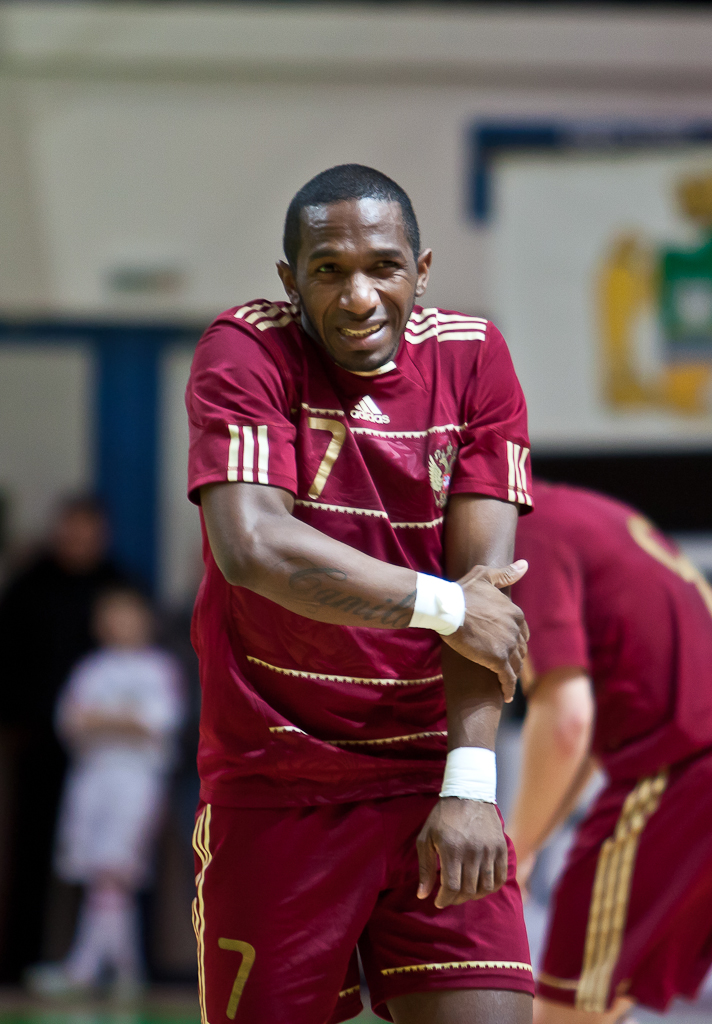 Пула во время товарищеского матча Россия-Бразилия, 2011 год